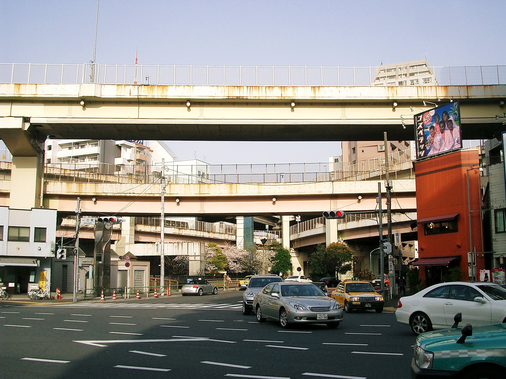 Ichinohashi JCT 一ノ橋ジャンクション